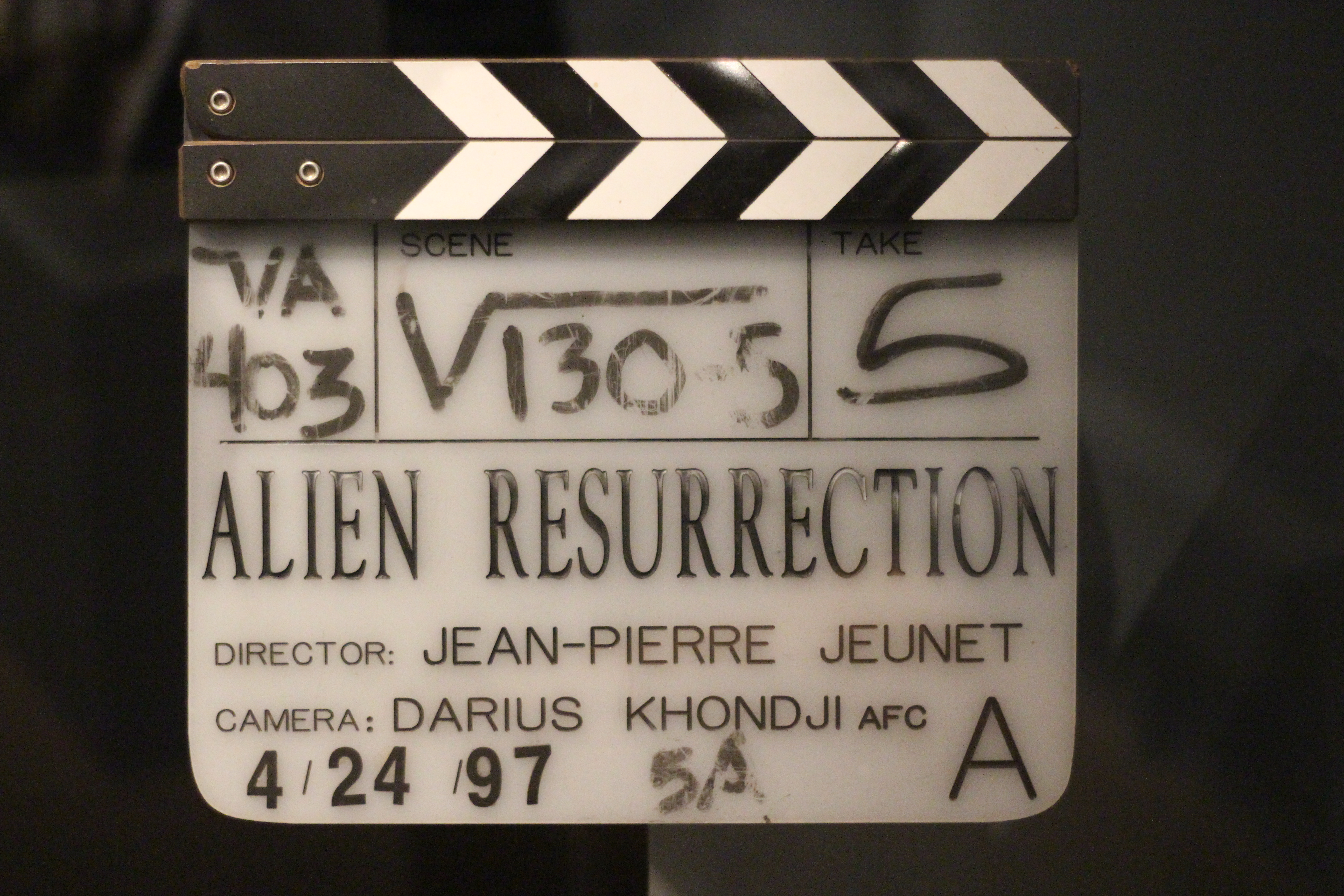 Exposition "Caro/Jeunet" au musée Minature et Cinéma en 2018-2019.